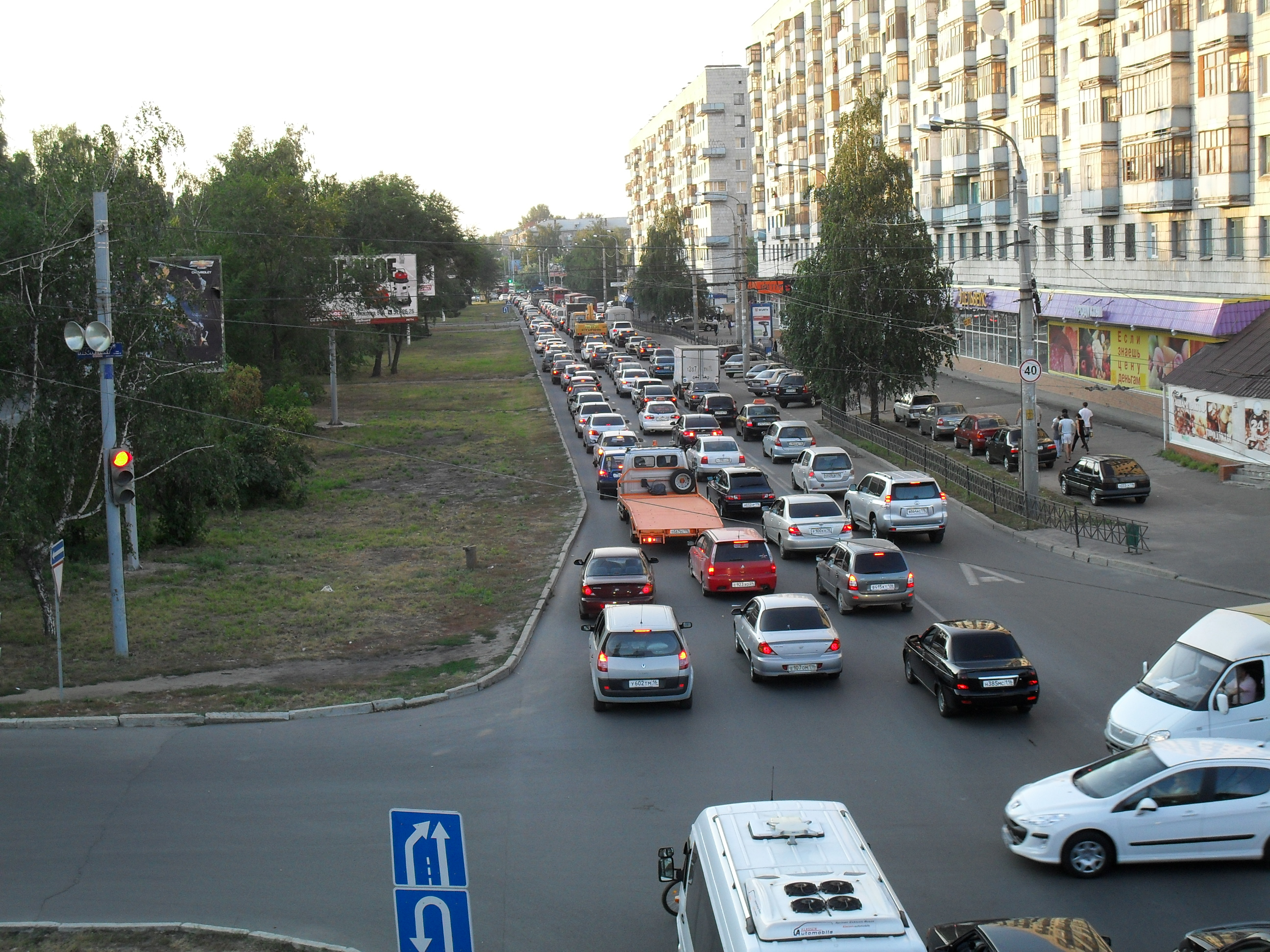 Вечерняя пробка на проспекте Ибрагимова (Казань)